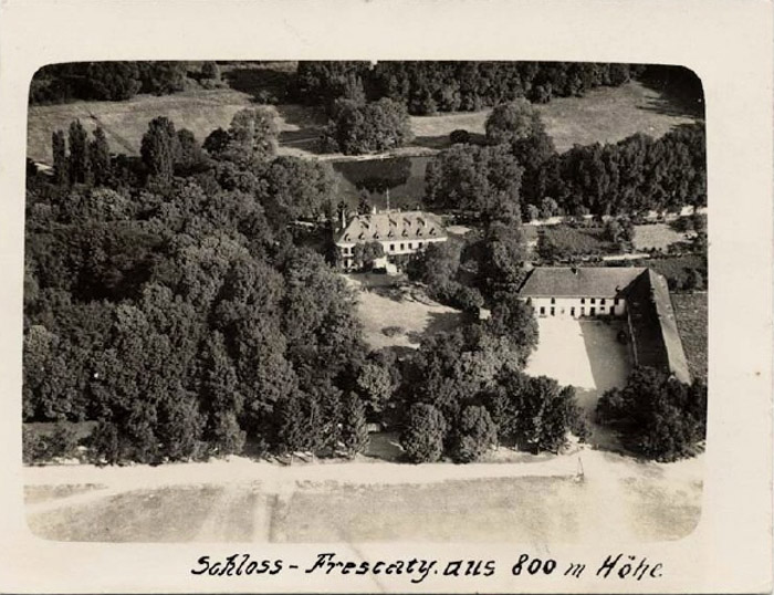 Kaserne Schloß Frescaty in Metz/Montigny